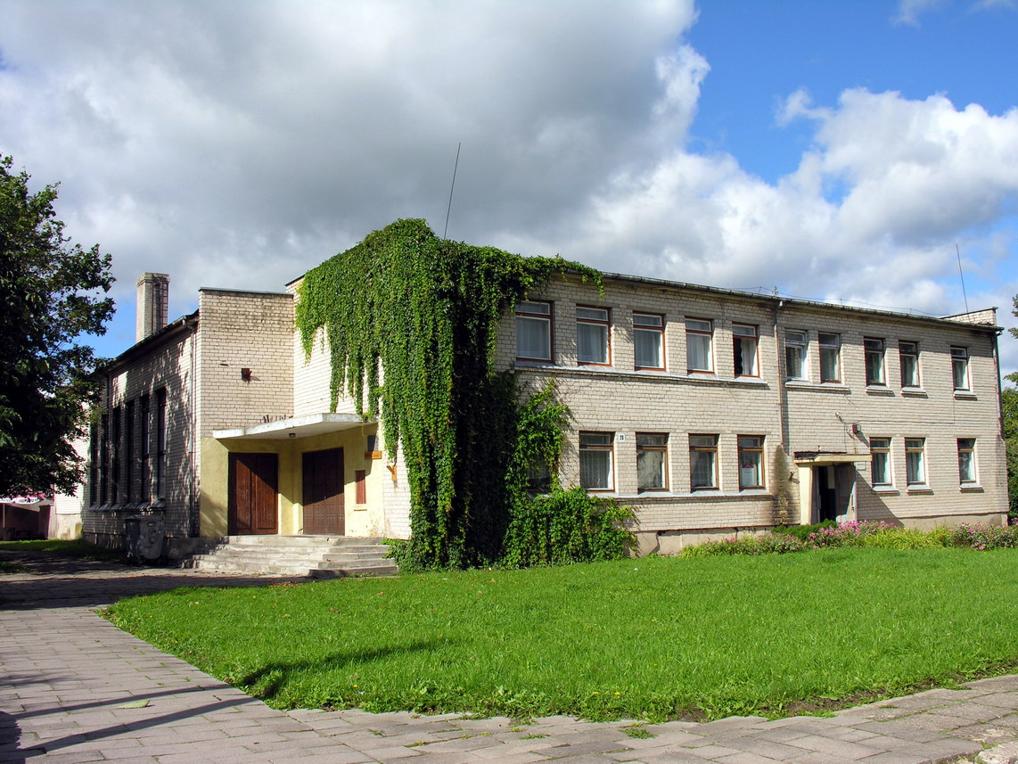 Židikai, Mažeikių raj. Židikų kultūros namai ir Mažeikių muzikos mokyklos Židikų filialas Foto: Algirdas, 2006 m. rugsėjo 9 d., Lietuva